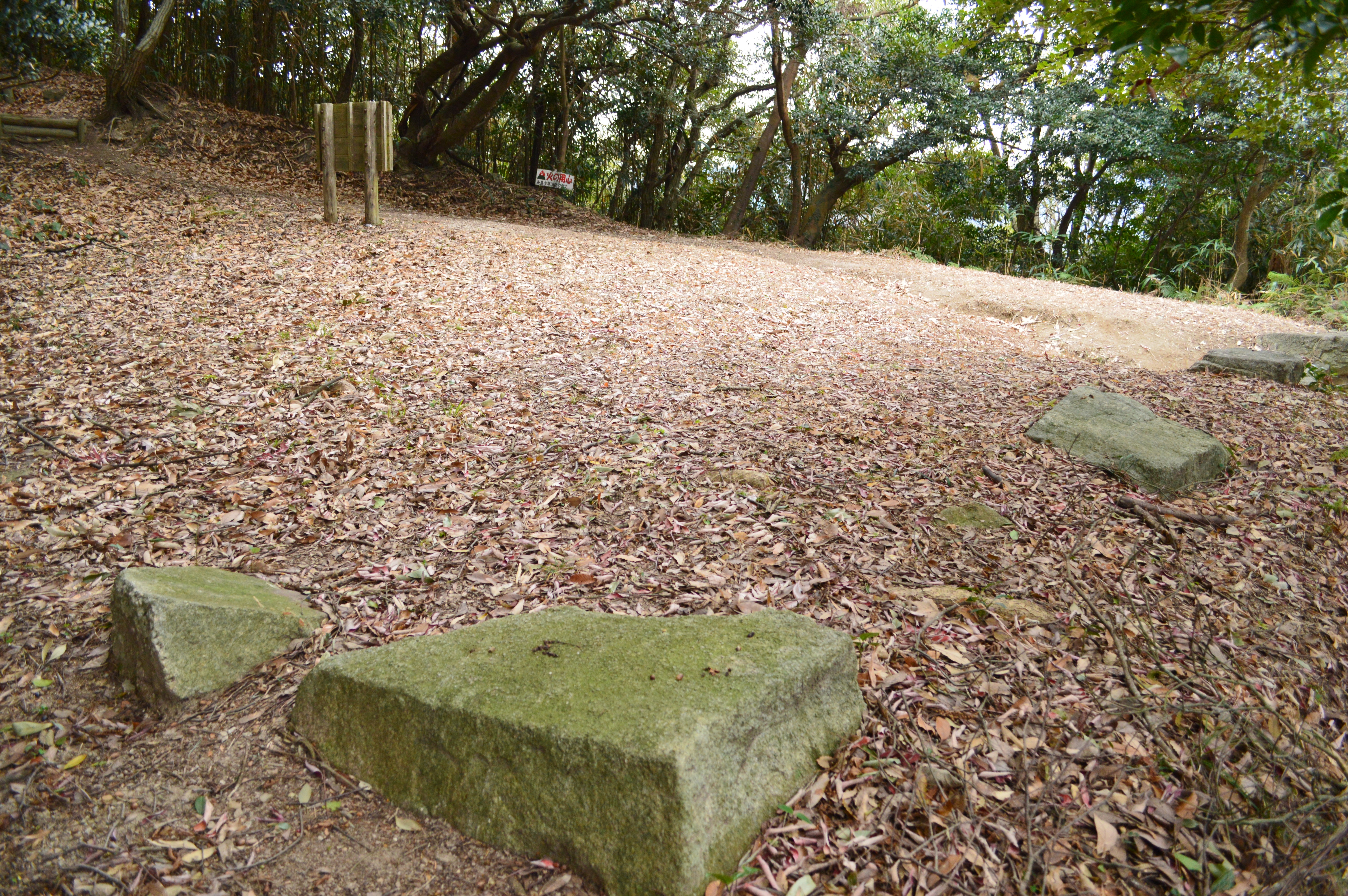 怡土城 一ノ坂礎石群